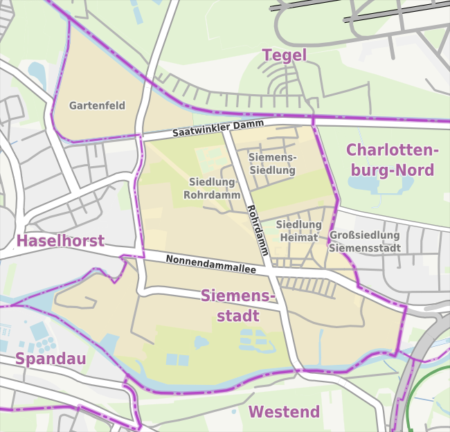 Übersichtskarte der Straßen und Ortslagen in Berlin-Siemensstadt